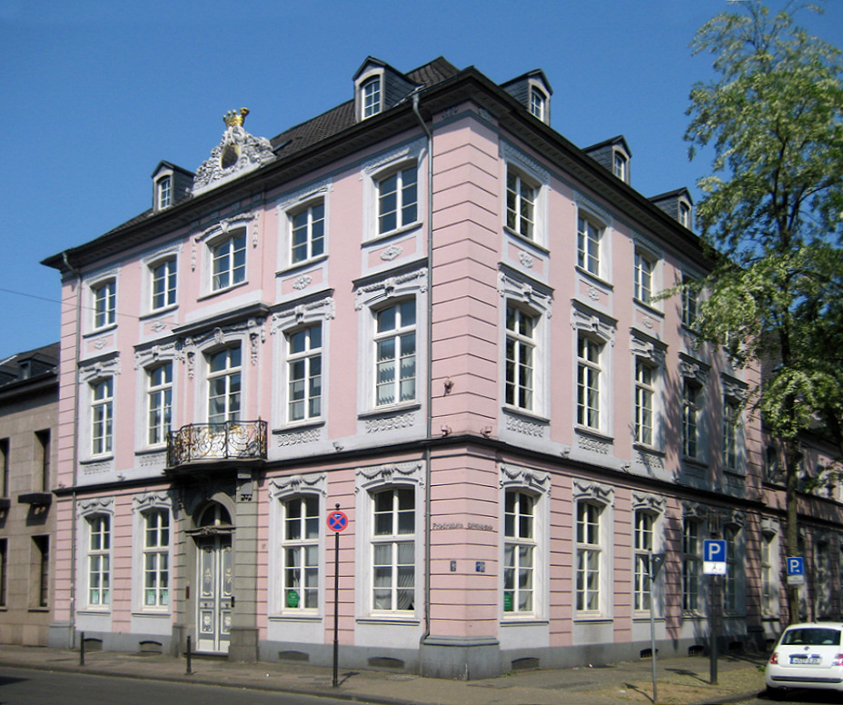 Haus Floh in der Friedrichstraße 27 in Krefeld This image shows a heritage building in Germany, located in the North Rhine-Westphalian city Krefeld (no. 324).